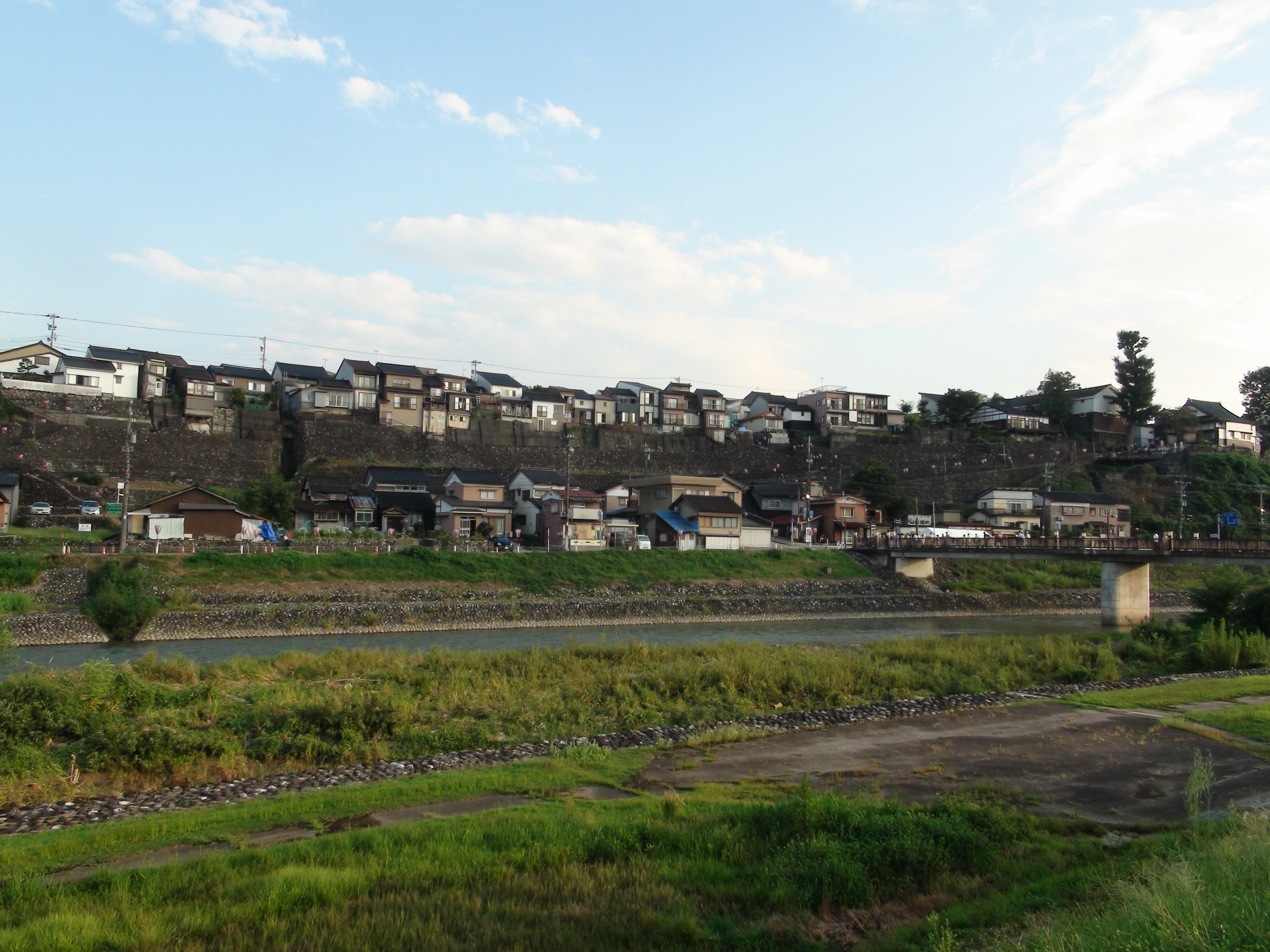 八尾町（富山県富山市）の河岸段丘の石垣。